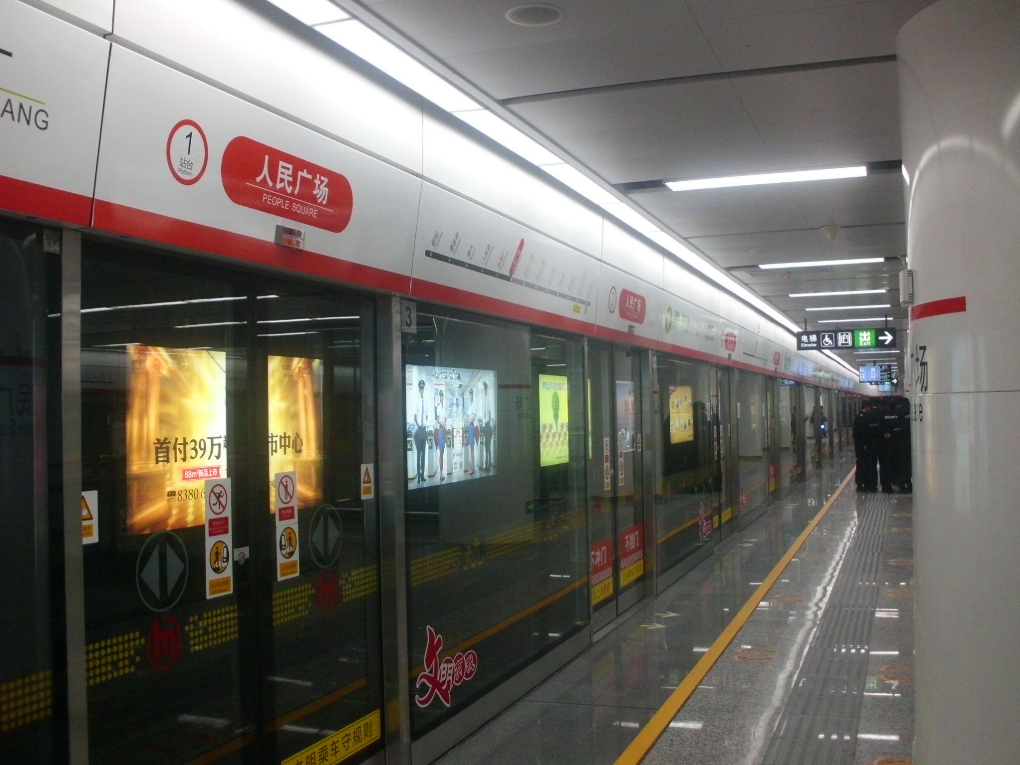 2号线人民广场站